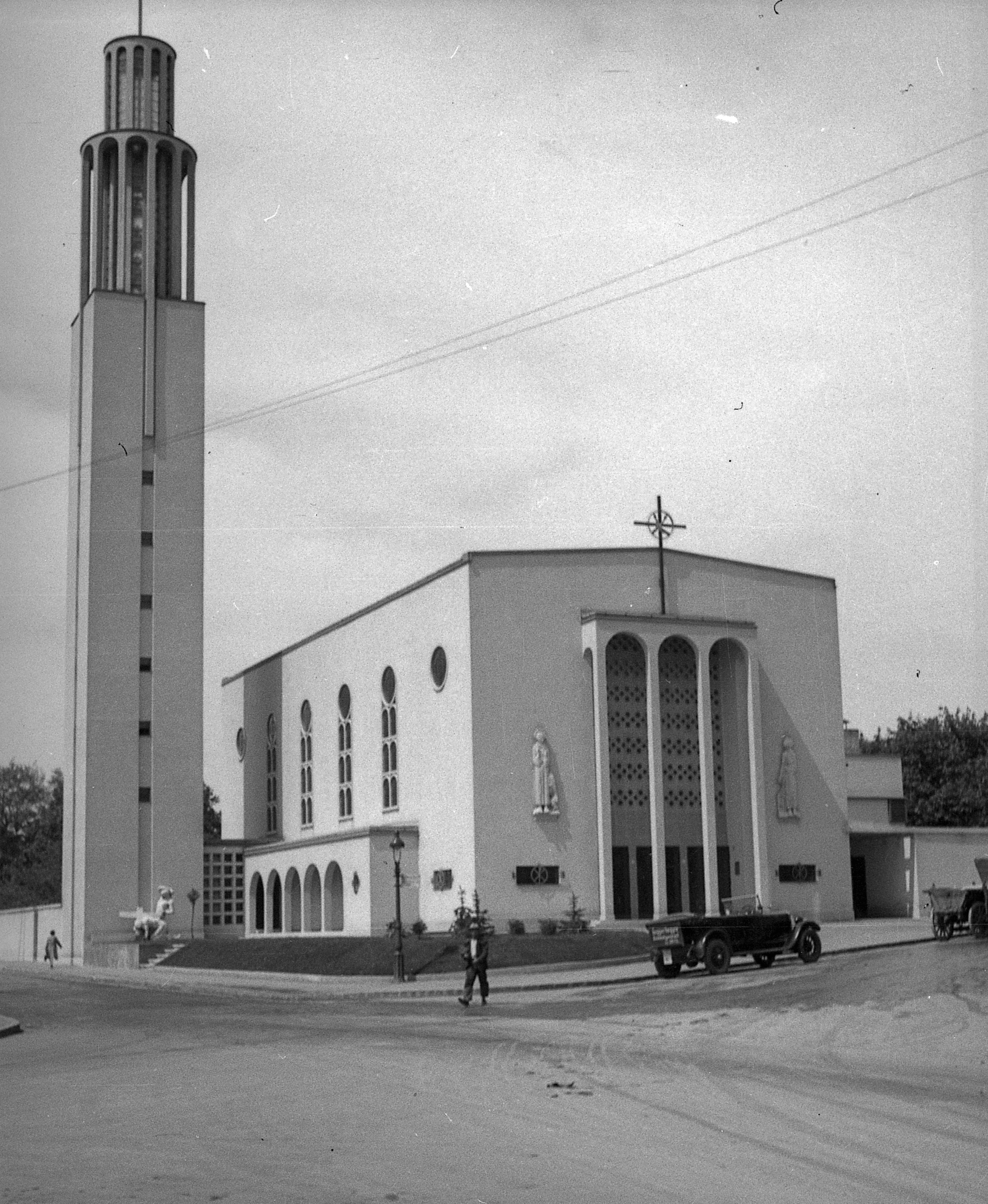 Pasaréti tér, Páduai Szent Antal-plébániatemplom. Location: Hungary, Budapest II. Tags: street view, automobile, Budapest Title: Pasaréti tér, Páduai Szent Antal-plébániatemplom.